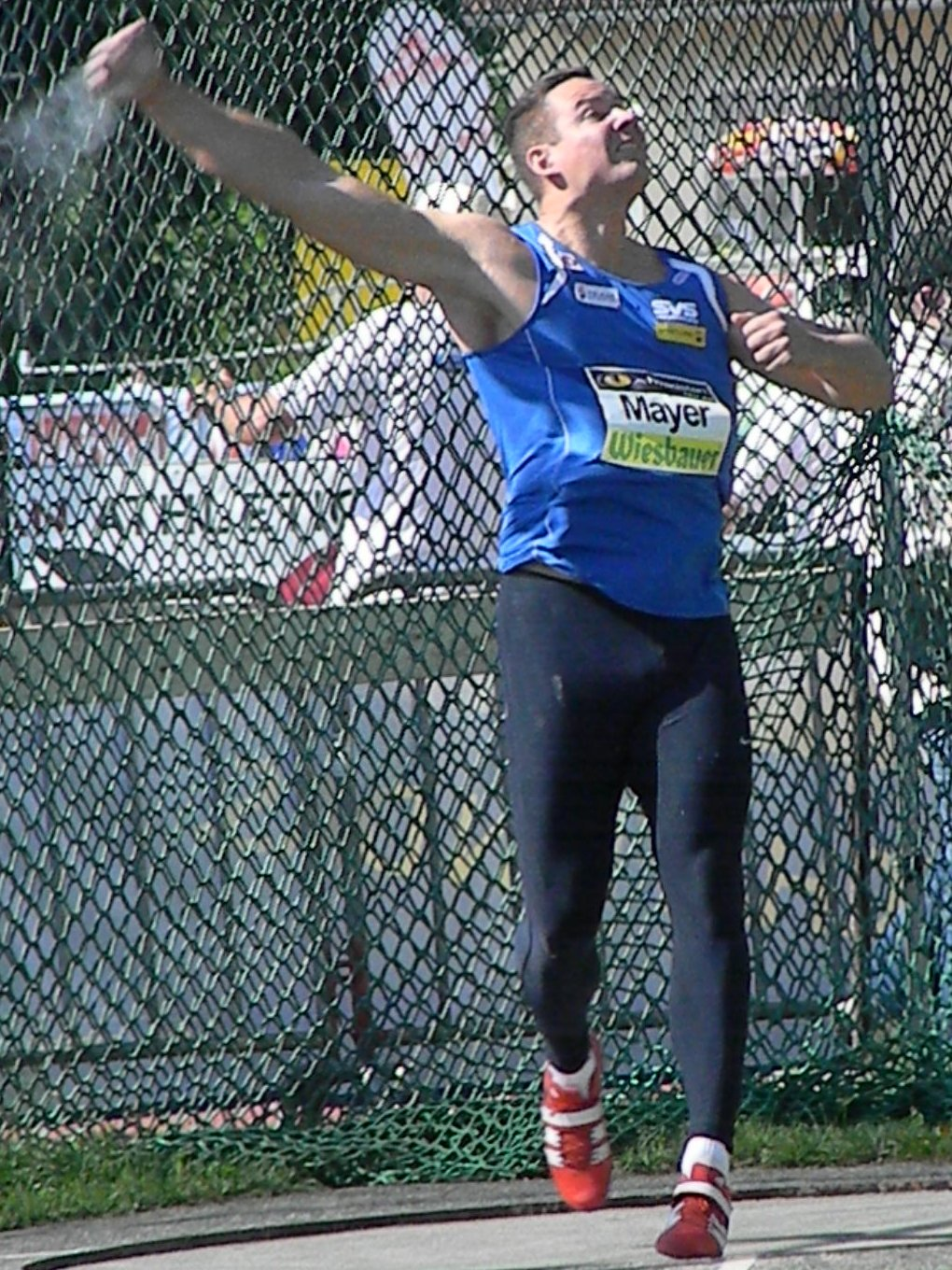 Gerhard Mayer bei/at Austrian Top Meeting Liese Prokop Memorial 2012